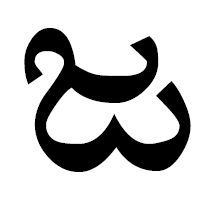 джакараву